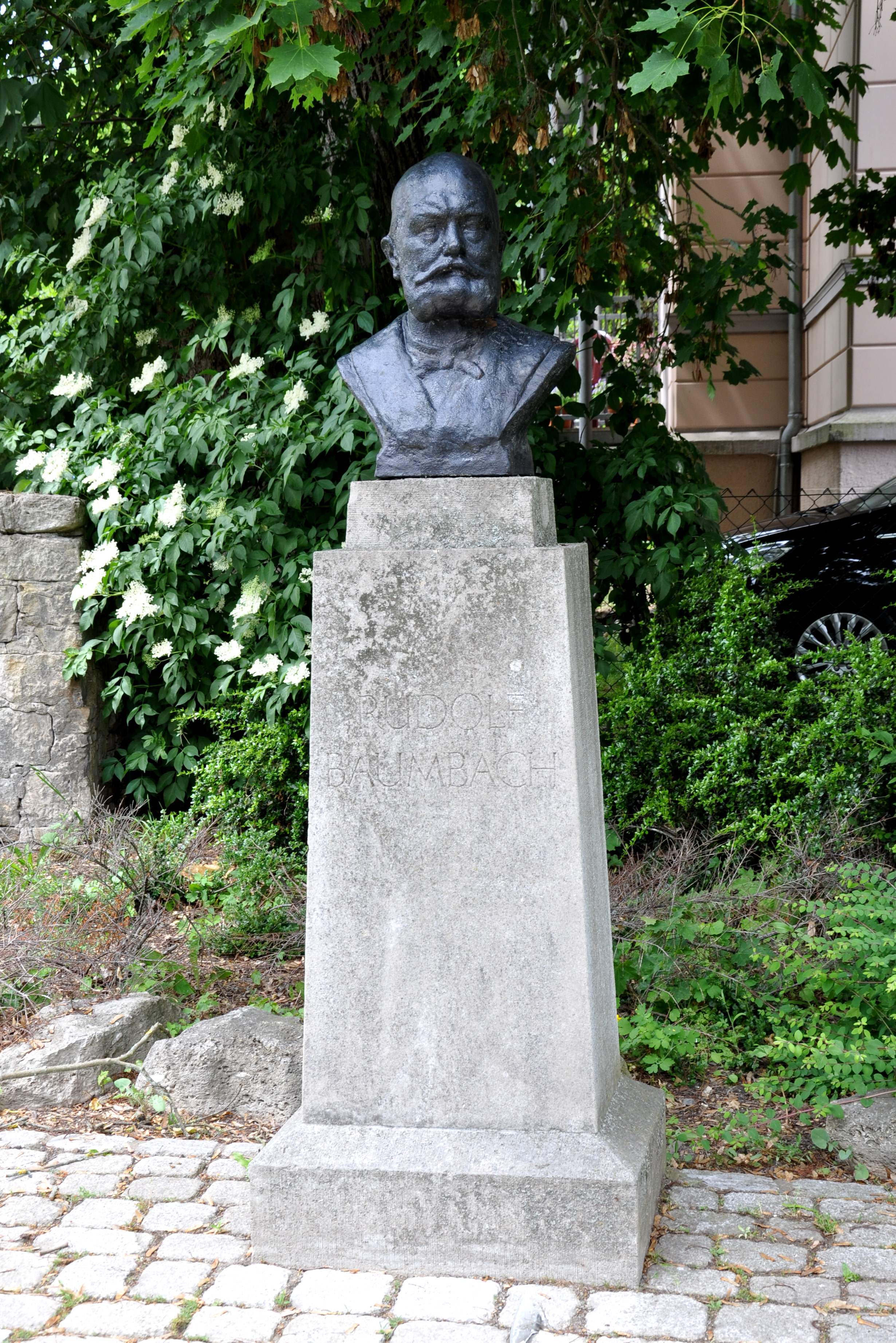 Meiningen, Baumbach-Denkmal in der Burggasse